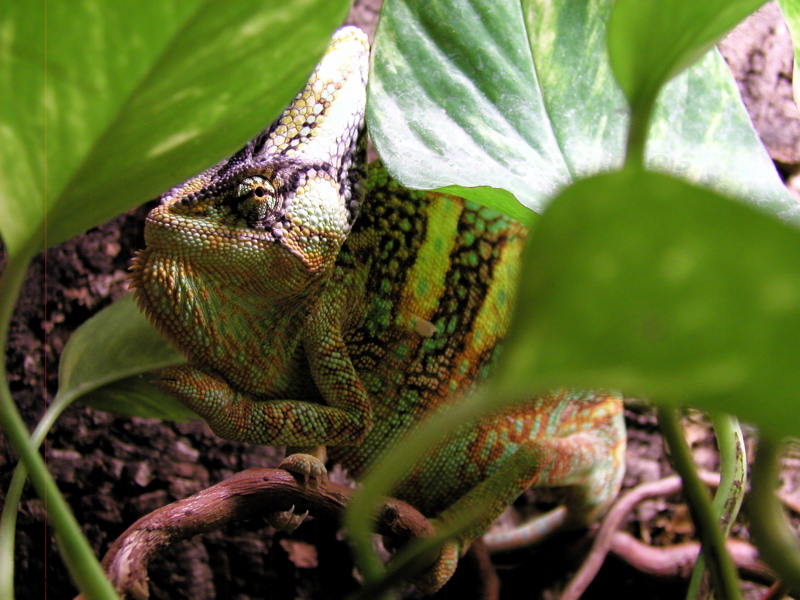 Chamaeleo calyptratus, Nordjemen Erlaubnis: E-mail an Erik Möller, 4. Oktober 2005